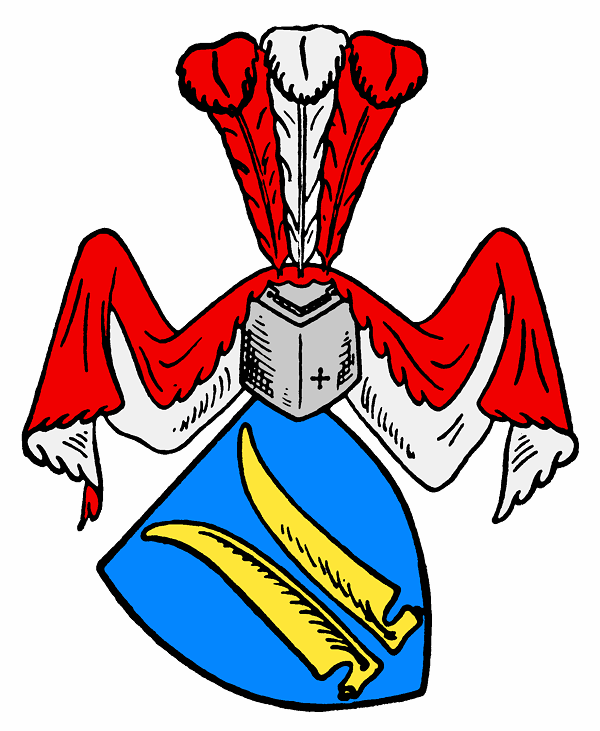 Wappen der von Bissingen